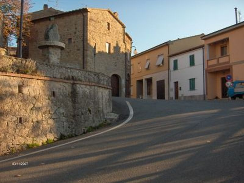 Lustignano - Entrata del Borgo